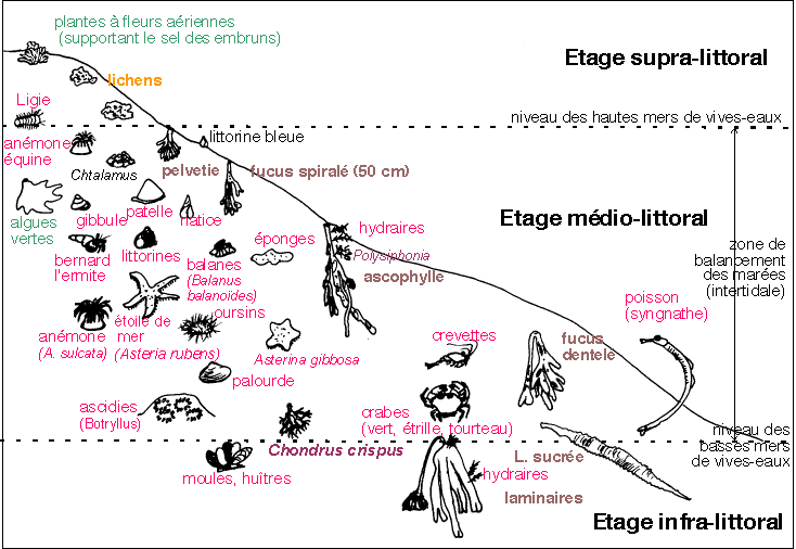 La répartition des algues sur l’estran